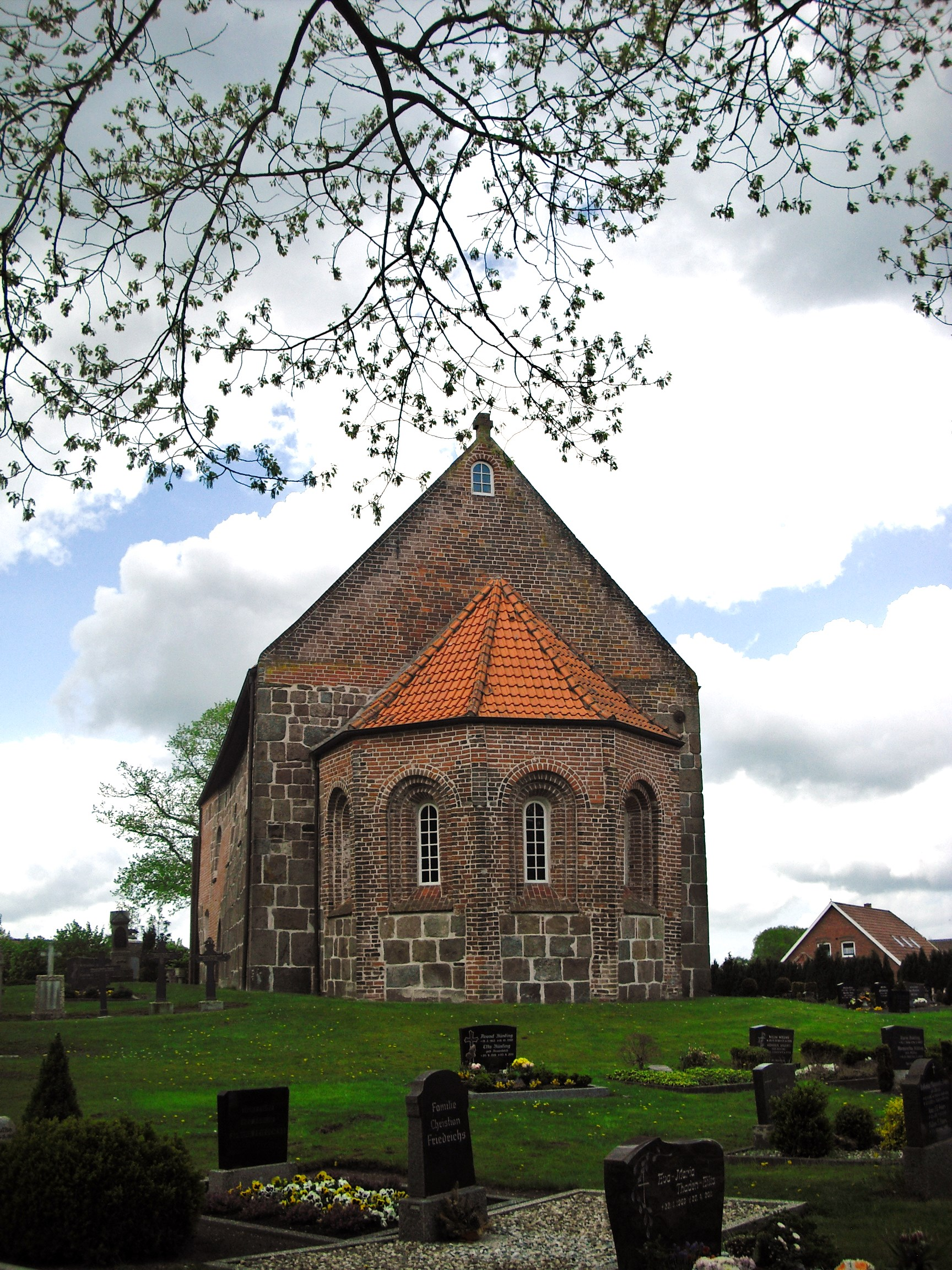 Evangelisch-lutherische Kirche in Middels (Stadtteil von Aurich, Landkreis Aurich, Niedersachsen, Deutschland): Kirchenansicht von Osten